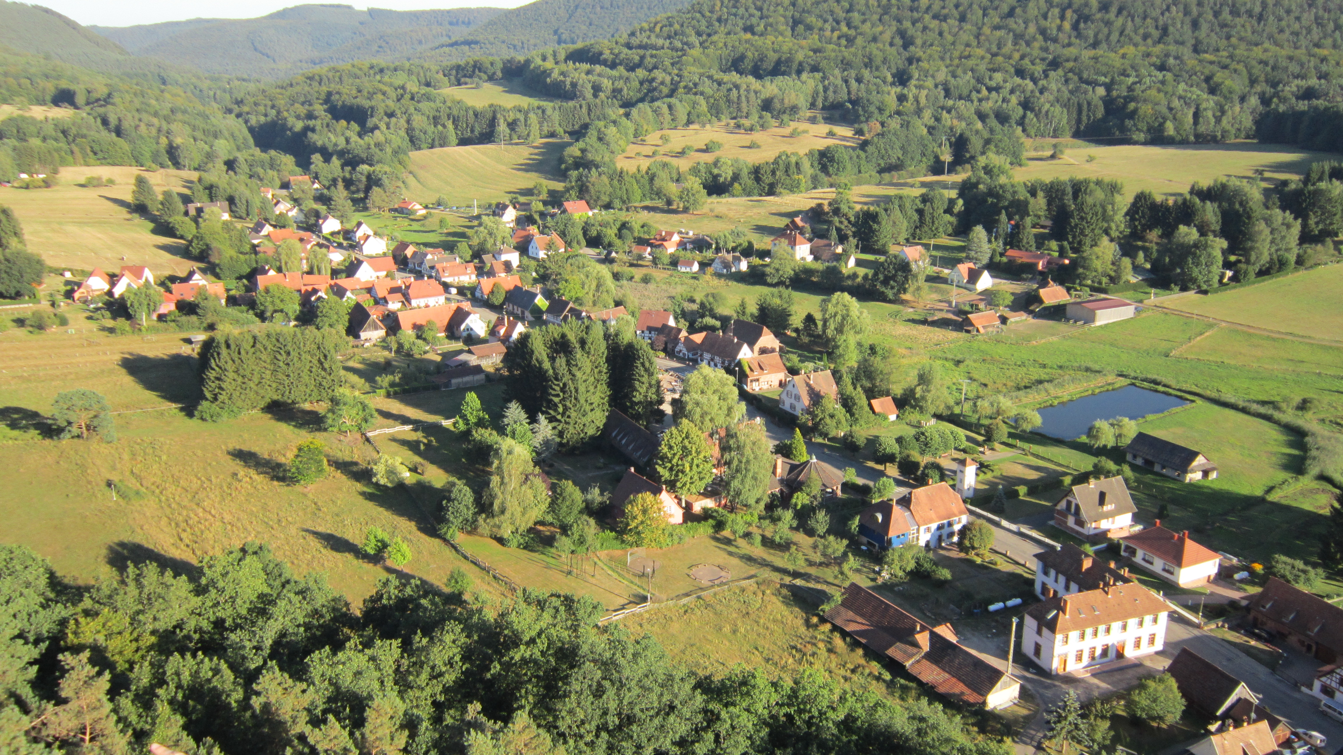 Vue générale d'Obersteinbach depuis le sommet du rocher d'escalade